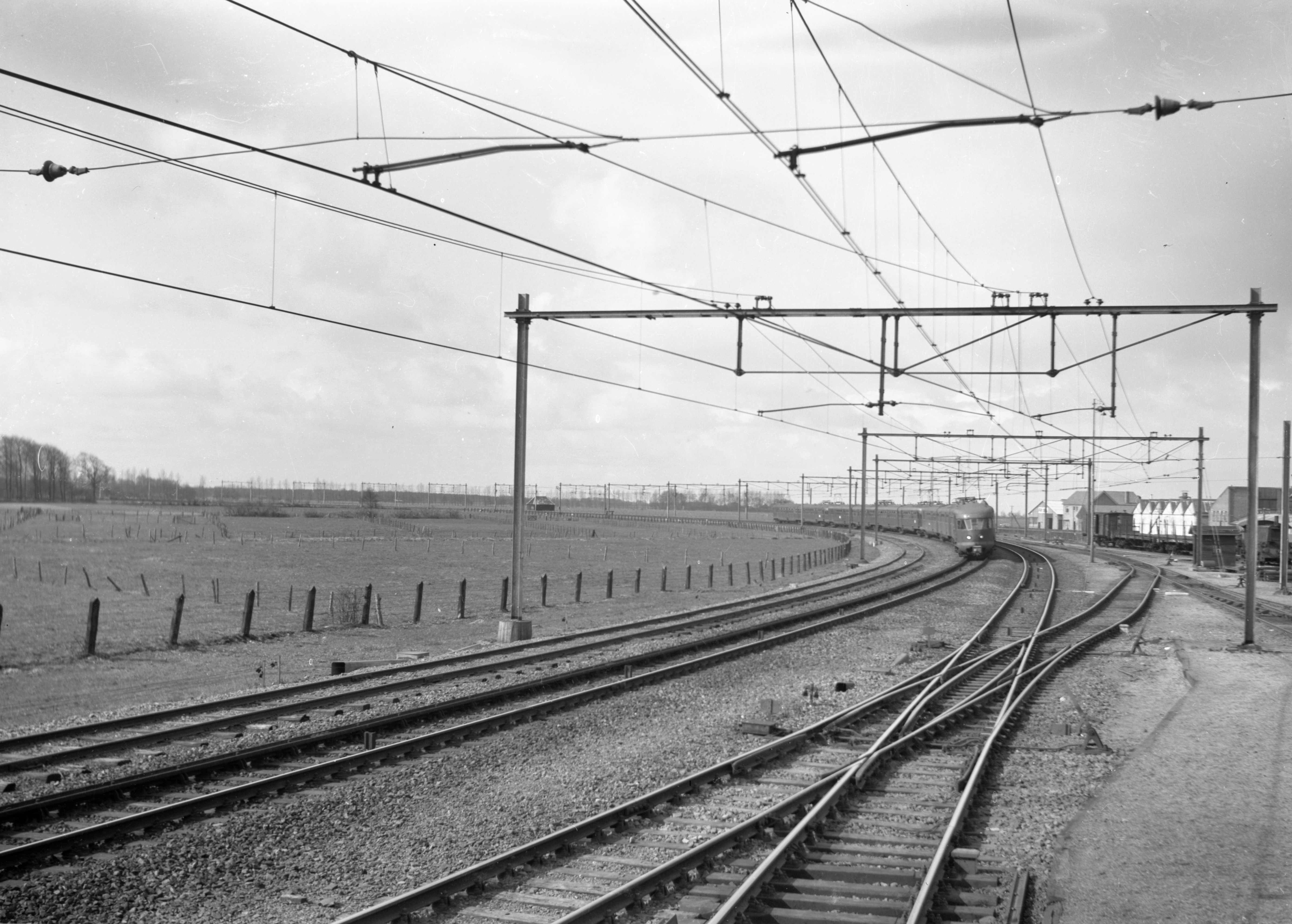 Afbeelding van een trein bestaande uit electrische treinstellen mat. 1946 van de N.S. in de boog te Harderwijk.